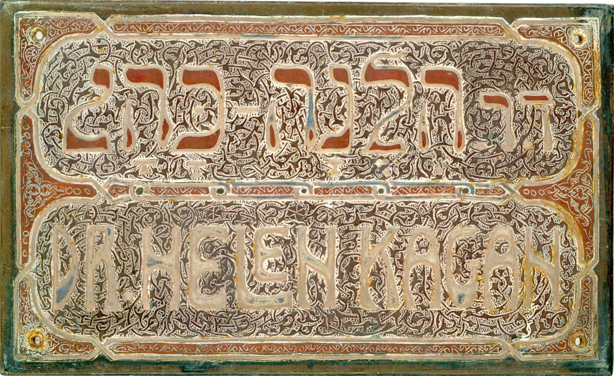 שלט הכניסה לבית של הלנה כגן